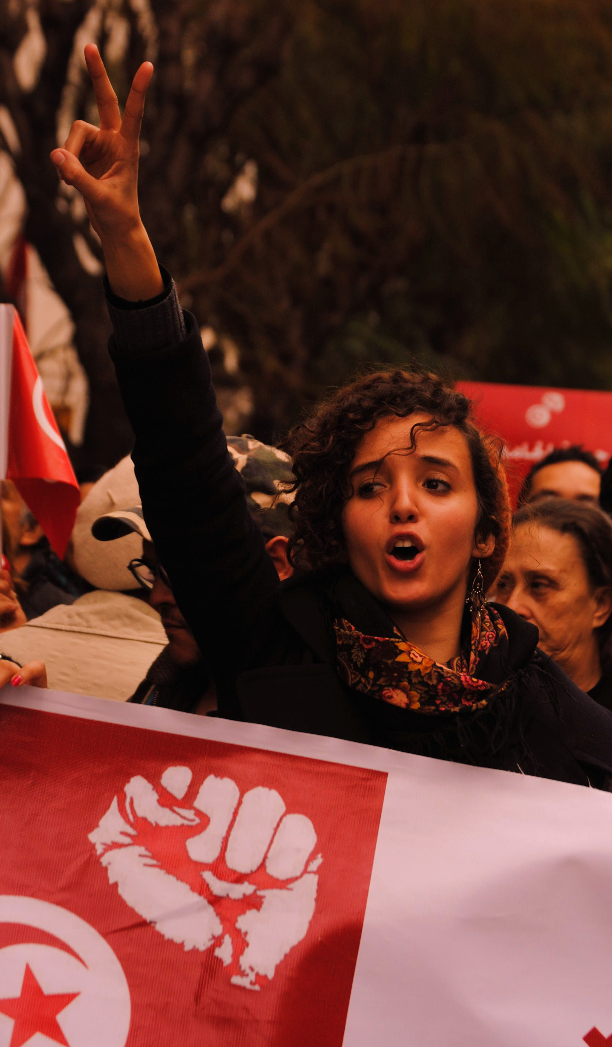 Manifestation pour les libertés organisé par plusieurs partis de l’opposition en Tunisie et des organisations de la société civile le samedi 28 janvier 2012 sur l’avenue Mohamed V, l’avenue Habib Bourguiba et l’avenue de Paris, pour appeler à défendre la liberté d’expression